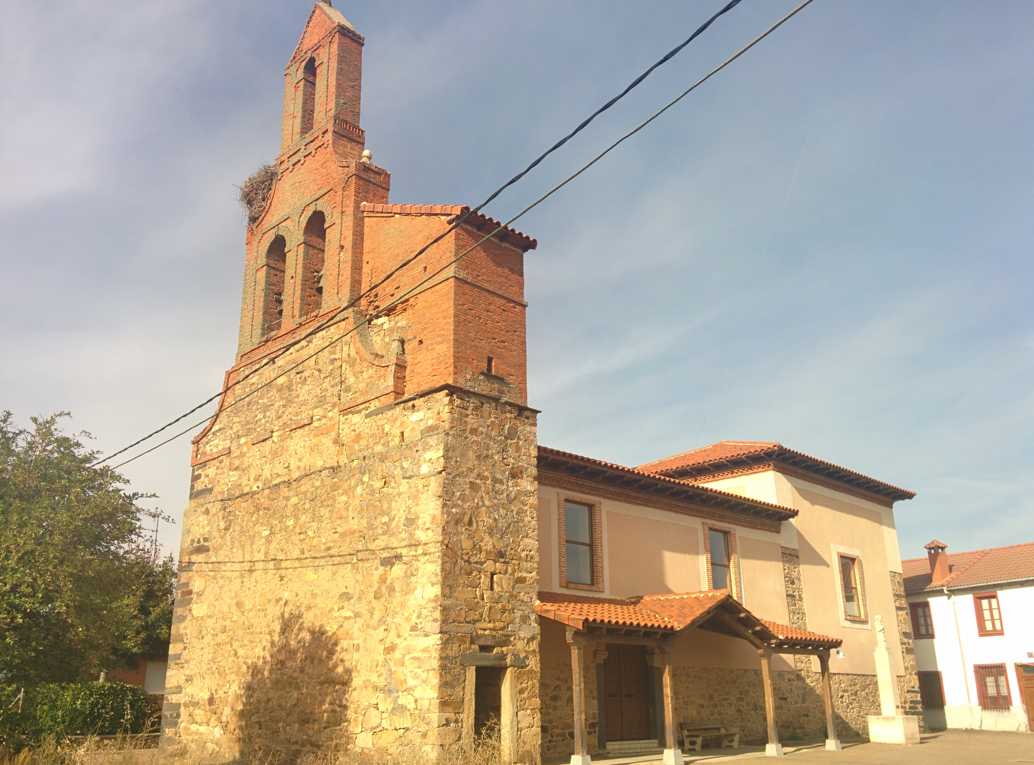 Iglesia de San Benito, Villamejil (León, España).